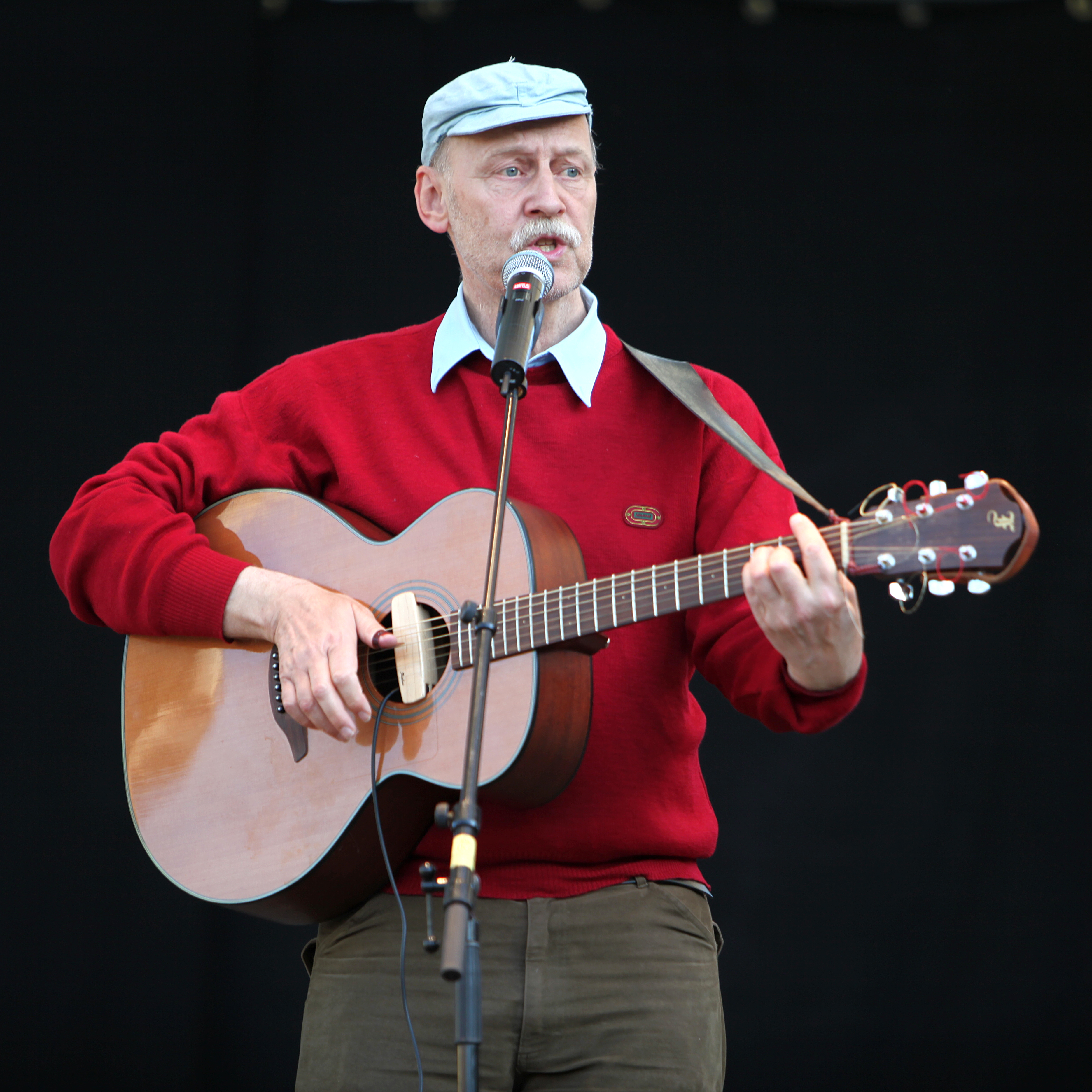 Jan Hammarlund, trubadur med härlig röst, underhåller i Kungsträdgården, Stockholm